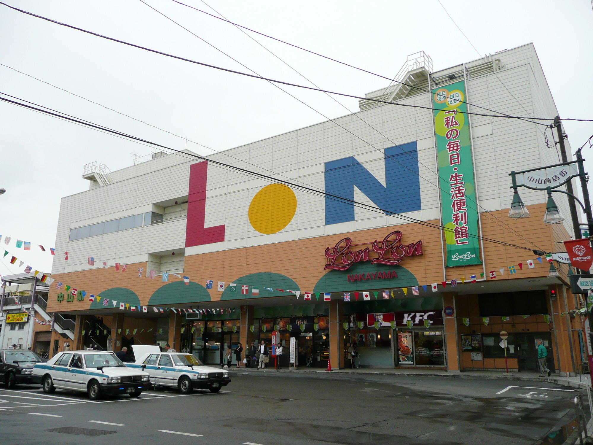 Nakayama Station (Kanagawa) south entrance. / JR横浜線中山駅南口